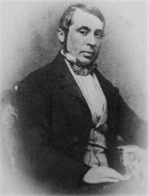 Johannes Hengst